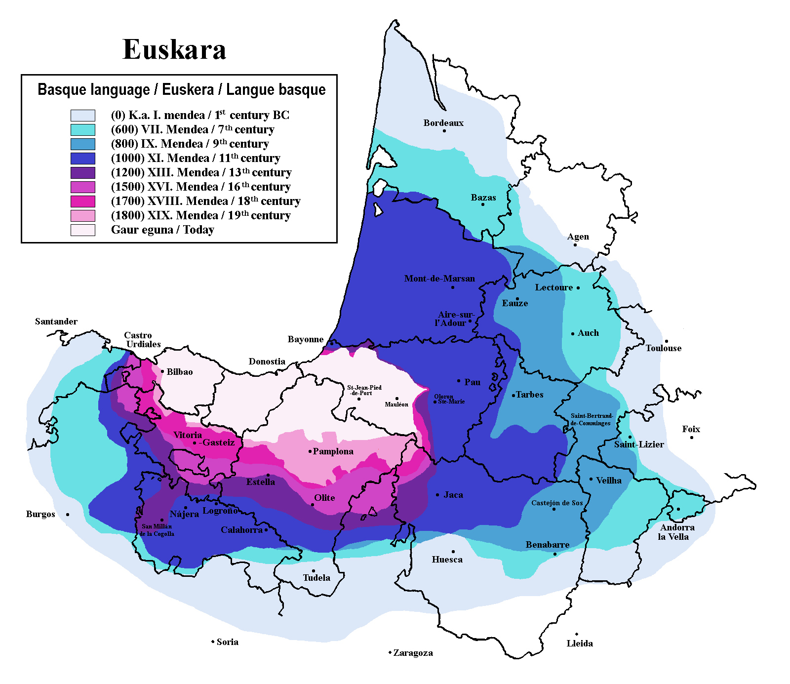 Aire linguistique de la langue basque depuis 2000 ans.